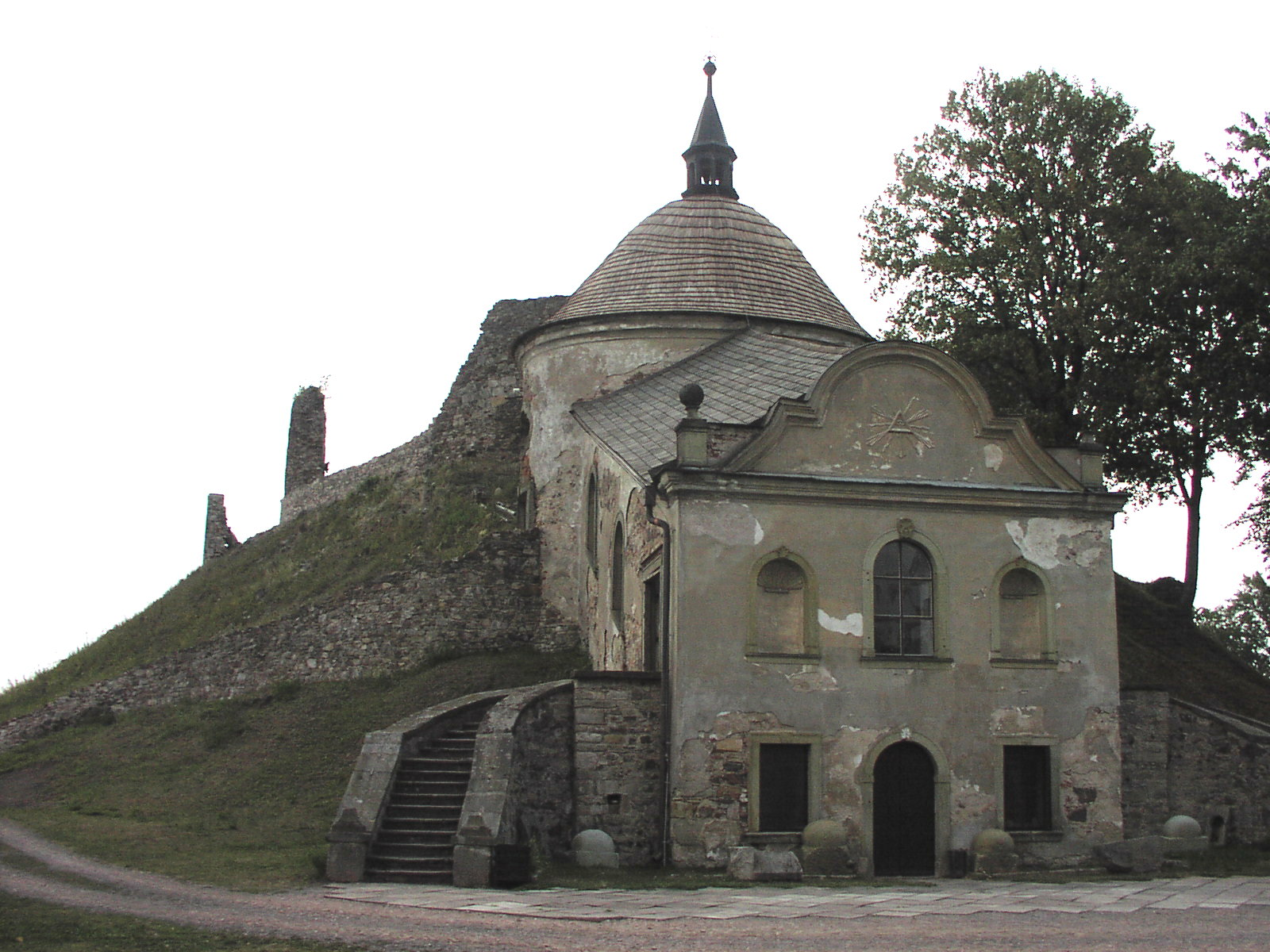 Česky: Kaple na Potštejnském hradě